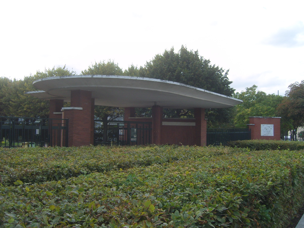 Paris 13e arrondissement - parc Kellermann - accès sur le boulevard Kellermann